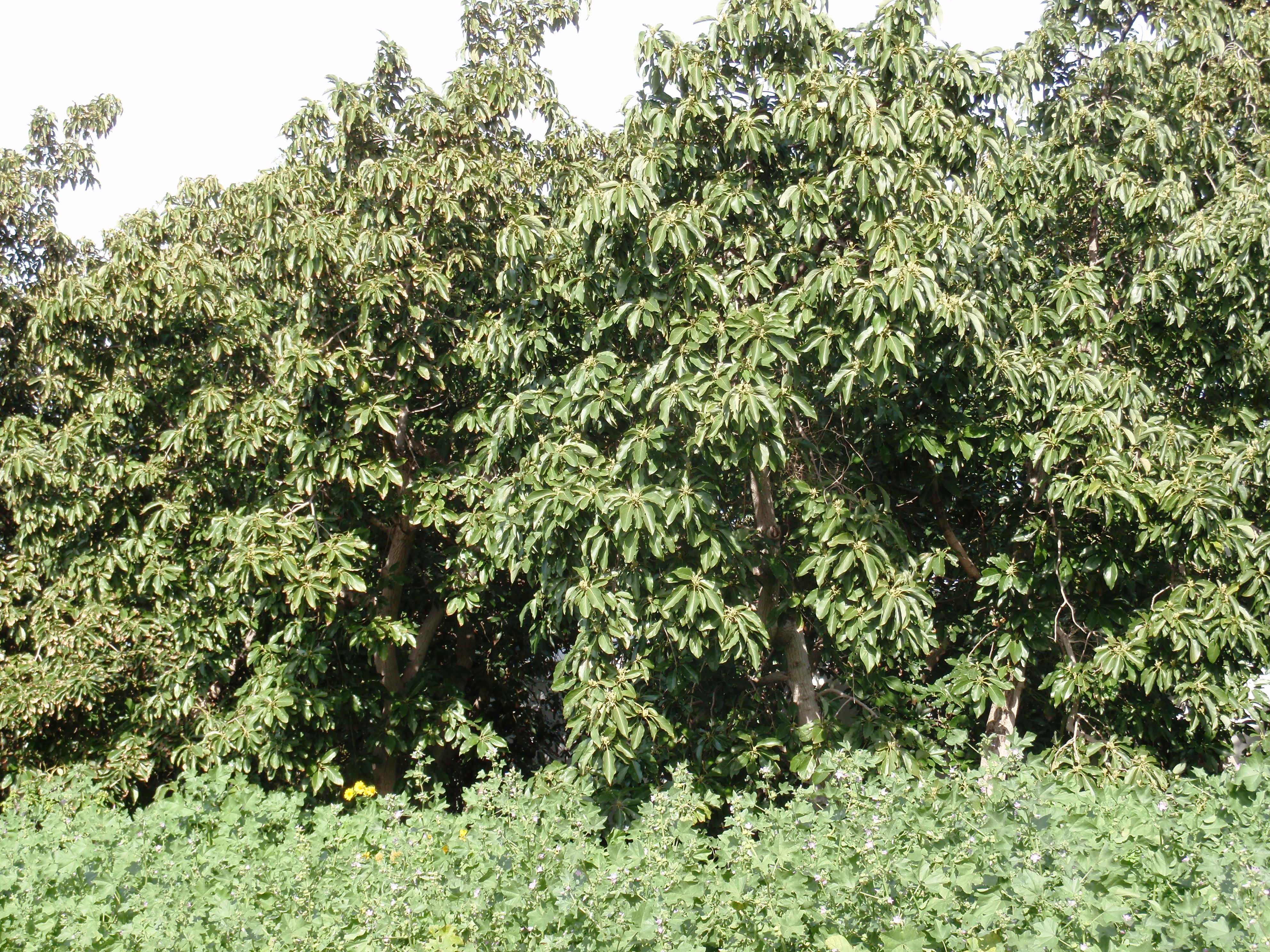 מטע אבוקדו